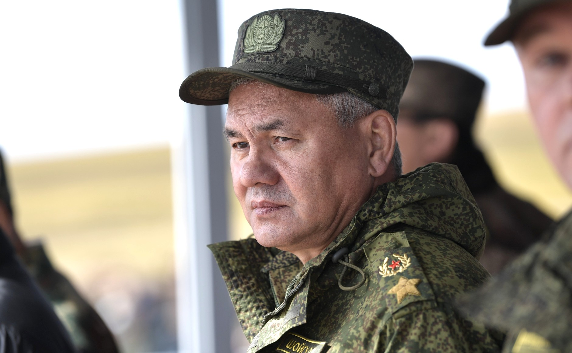 Основной этап манёвров «Восток-2018» на полигоне Цугол в Забайкальском крае.